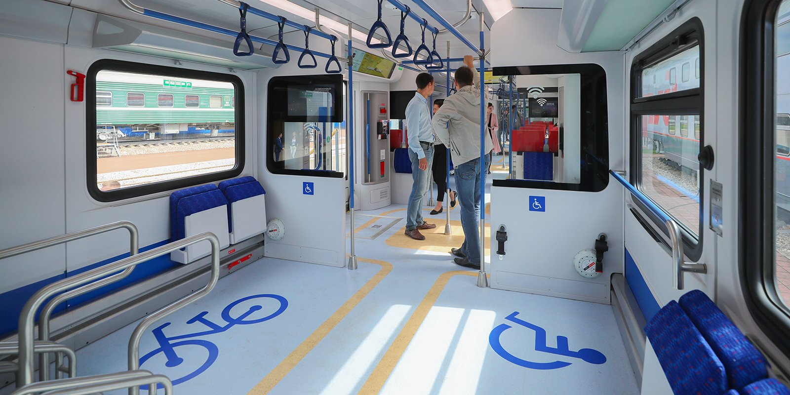 Салон головного вагона электропоезда ЭГ2Тв-027 «Иволга». Вид назад из передней части